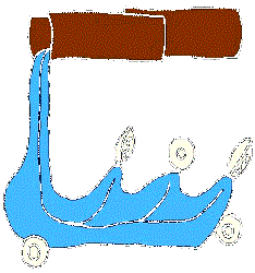 Glifo de Atlapexco, Hidalgo